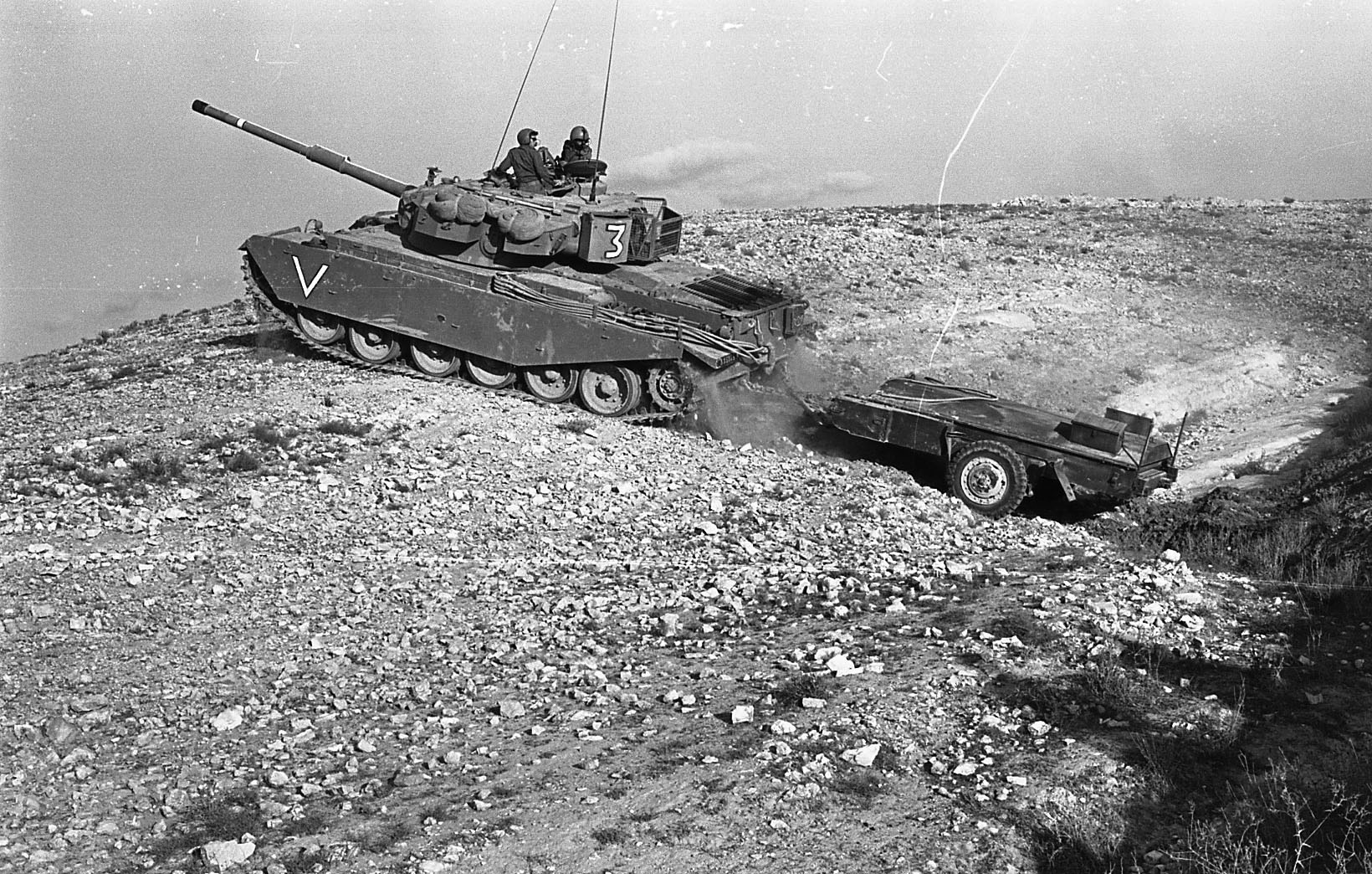 "עגלה 34" היא מערכת פריצת שד"מ (שדות מוקשים) נ"ט (נגד טנקים). הפעלת המערכת יצרה נתיב בטוח למעבר רק"מ (רכב קרבי משוריין) באורך של 100 מטר וברוחב של כ-12 מטר.